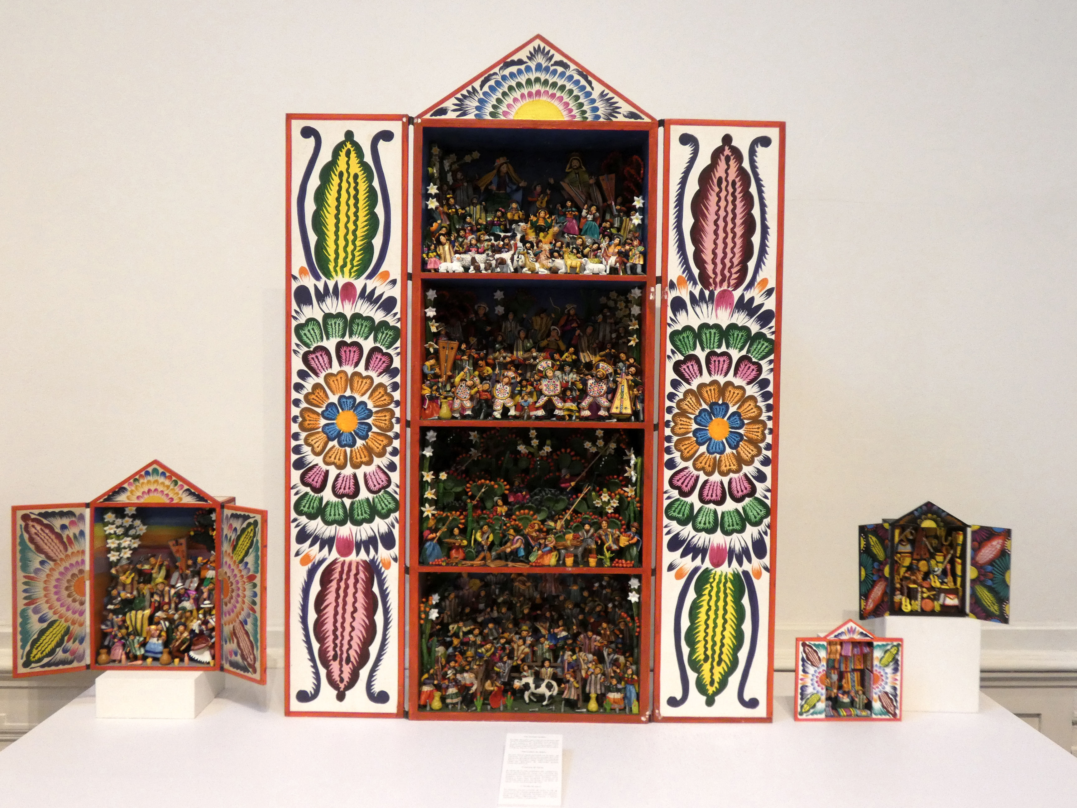 Detalle de la exposición "El retablo - Arte tradicional" (artistas: Julio y César Urbano) en el Centro Cultural Inca Garcilaso, Casa Aspíllaga, Lima, Peru